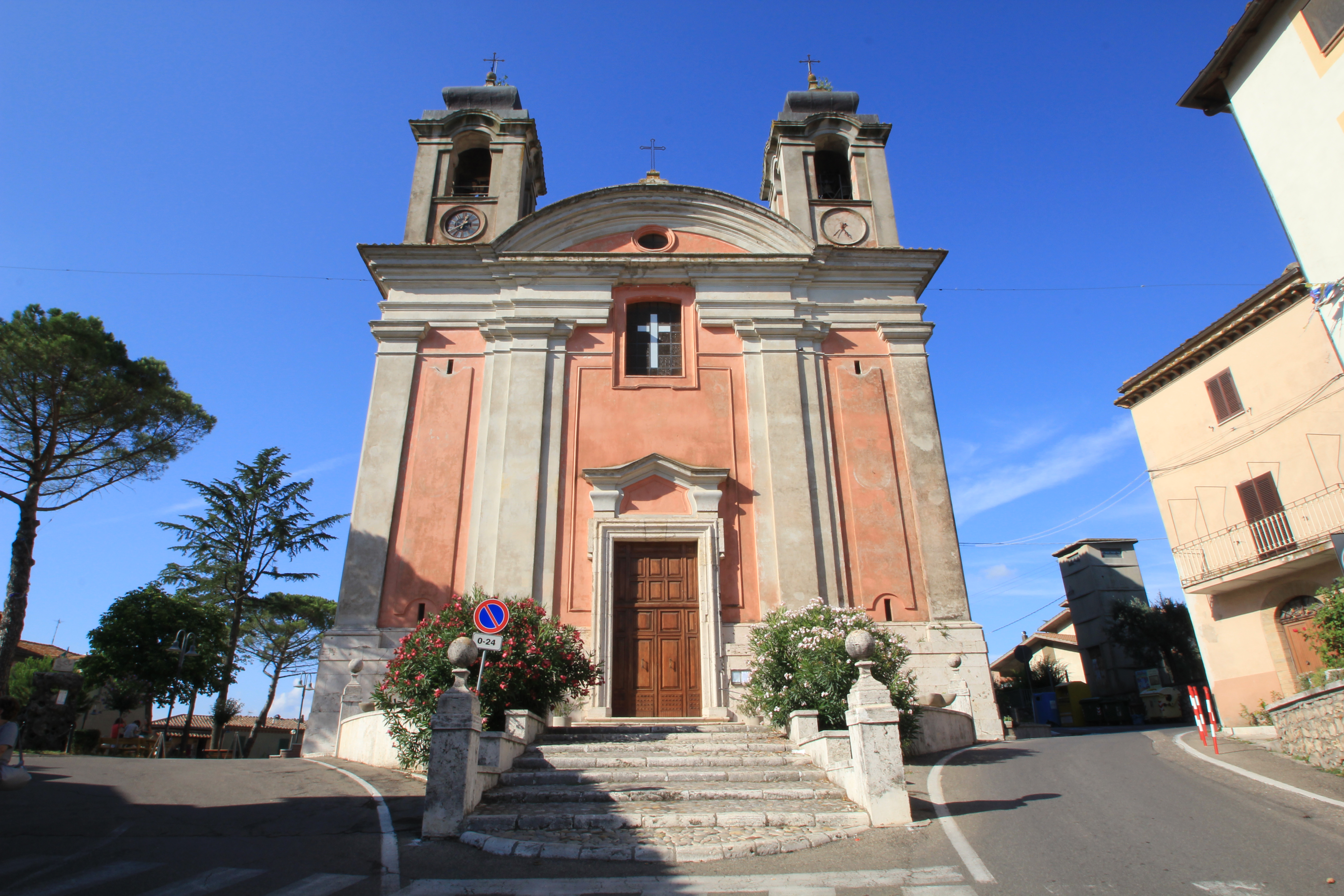 Chiesa parrocchiale di Santa Maria Assunta - Giove - Terni - Umbria - Italia